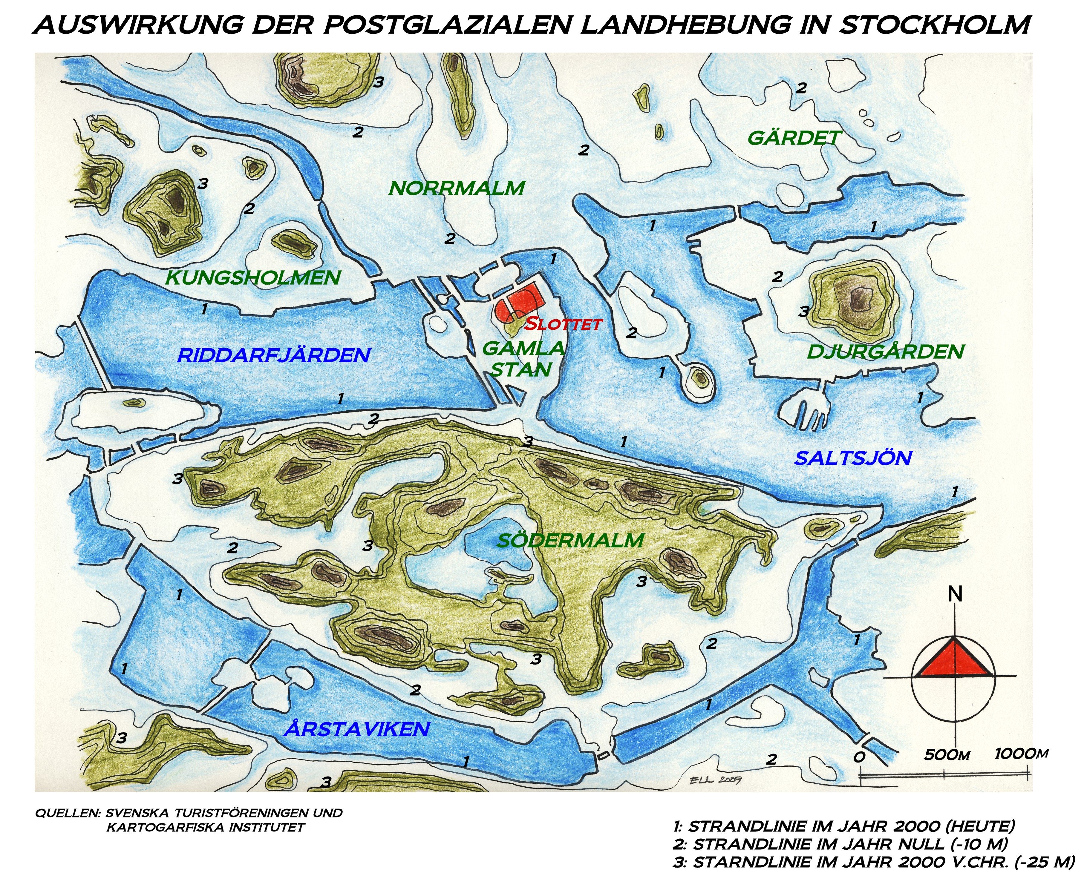 Die postglaciale Landhebung in Stockholm und Umgebung